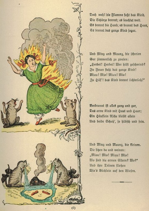 Der Struwwelpeter: Die gar traurige Geschichte mit dem Feuerzeug Tafel 2